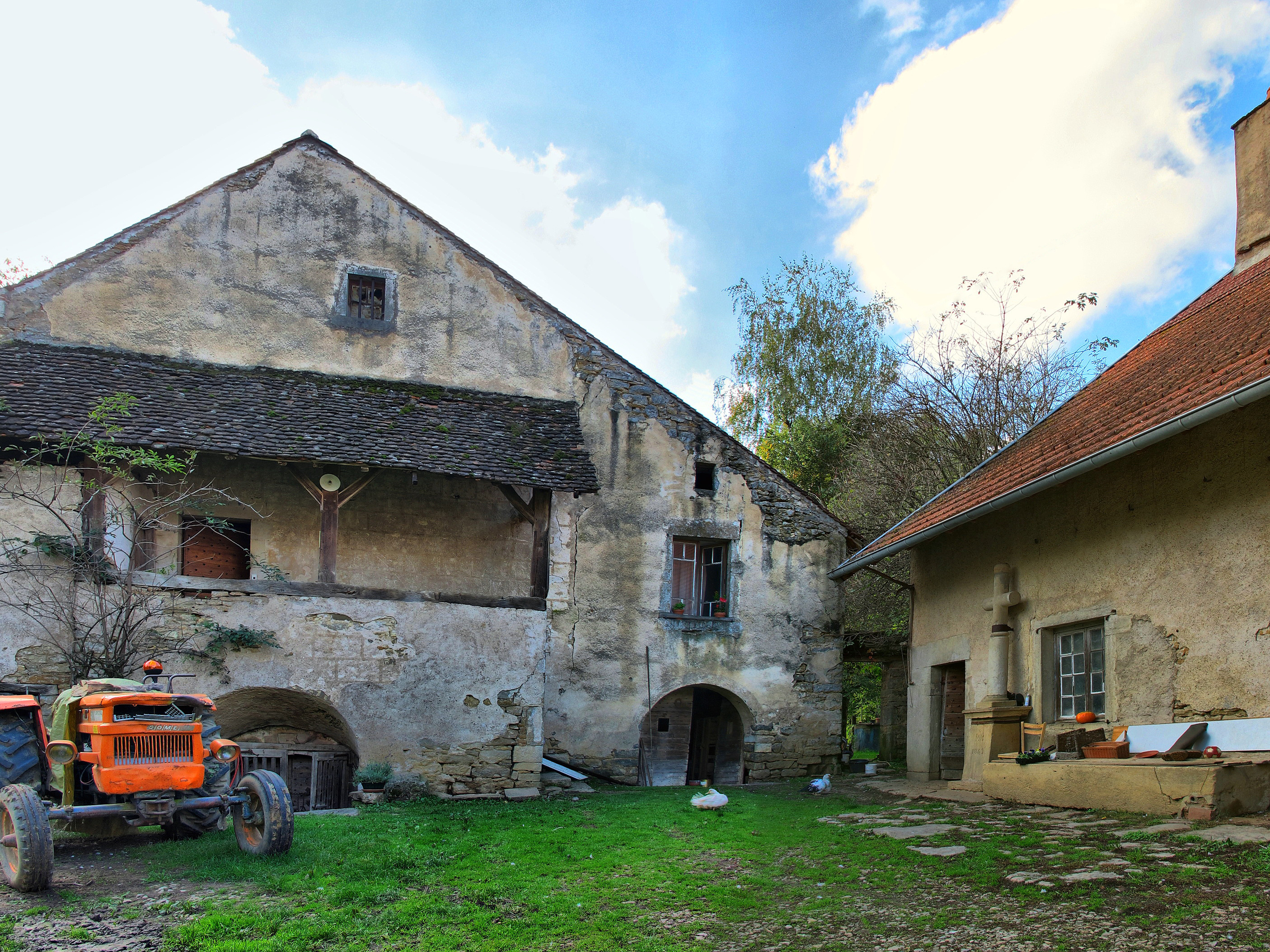 Inscrit aux monuments historiques sous le numéro PA00101636